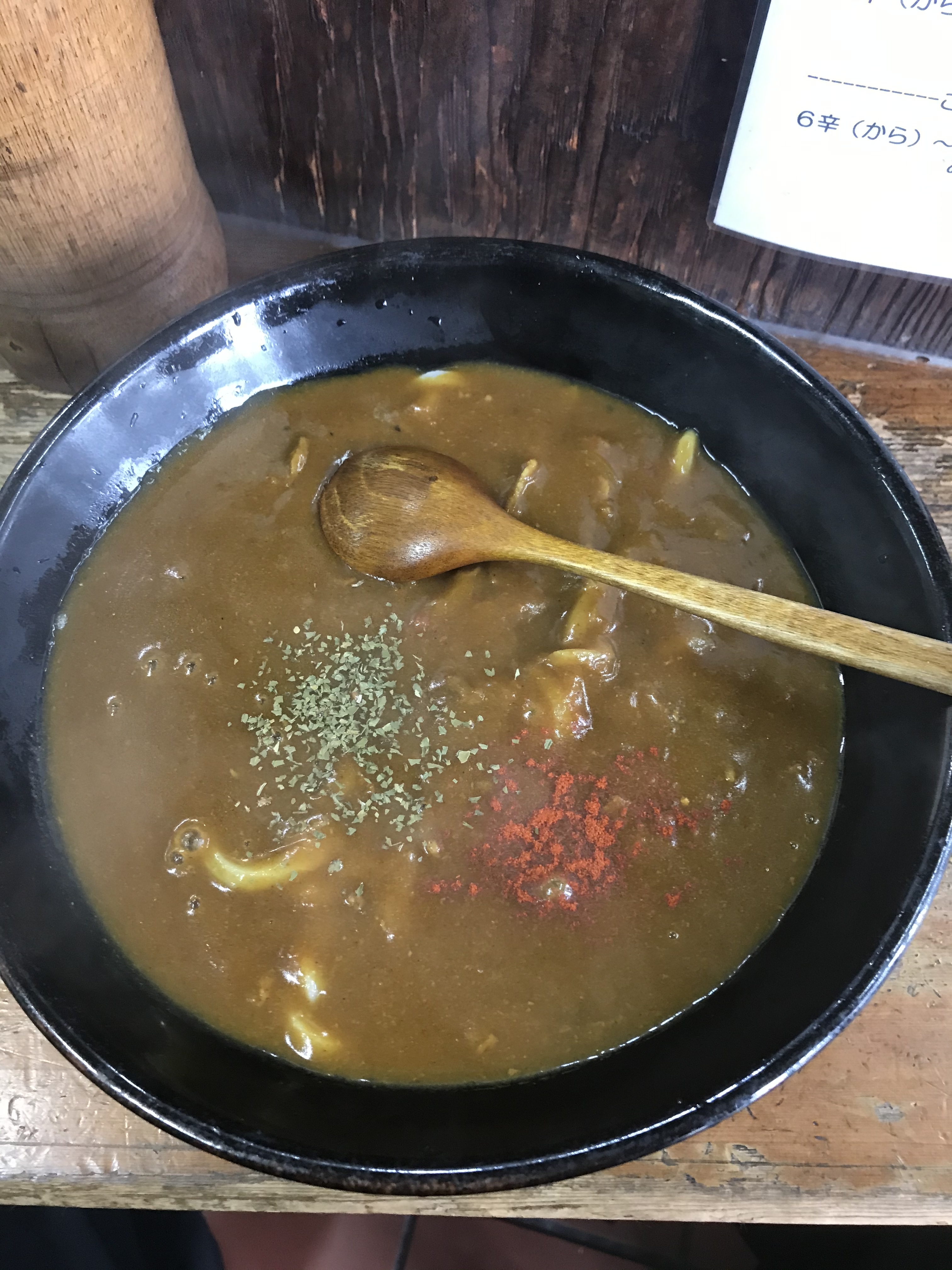 大阪・高槻の店舗で提供されたカレーうどん カレーに隠れて見えないが牛肉も入っている。